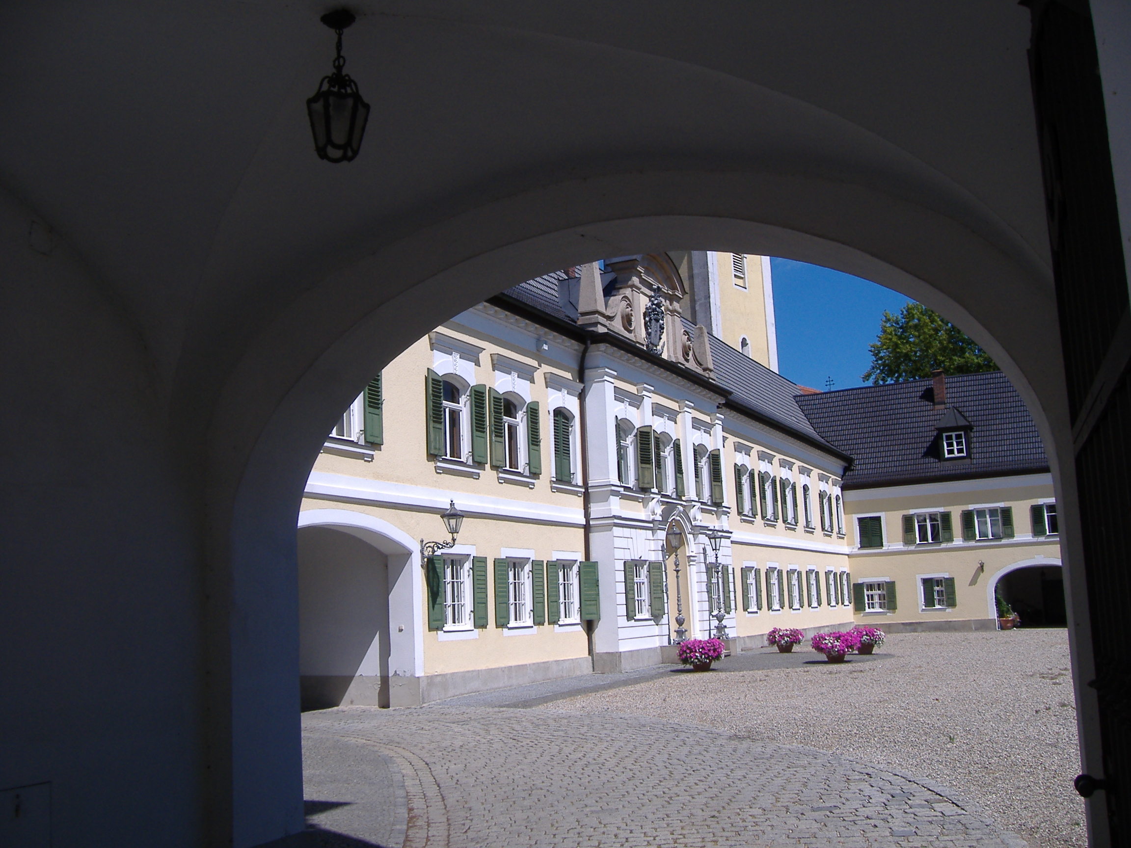 Schloss Kühbach